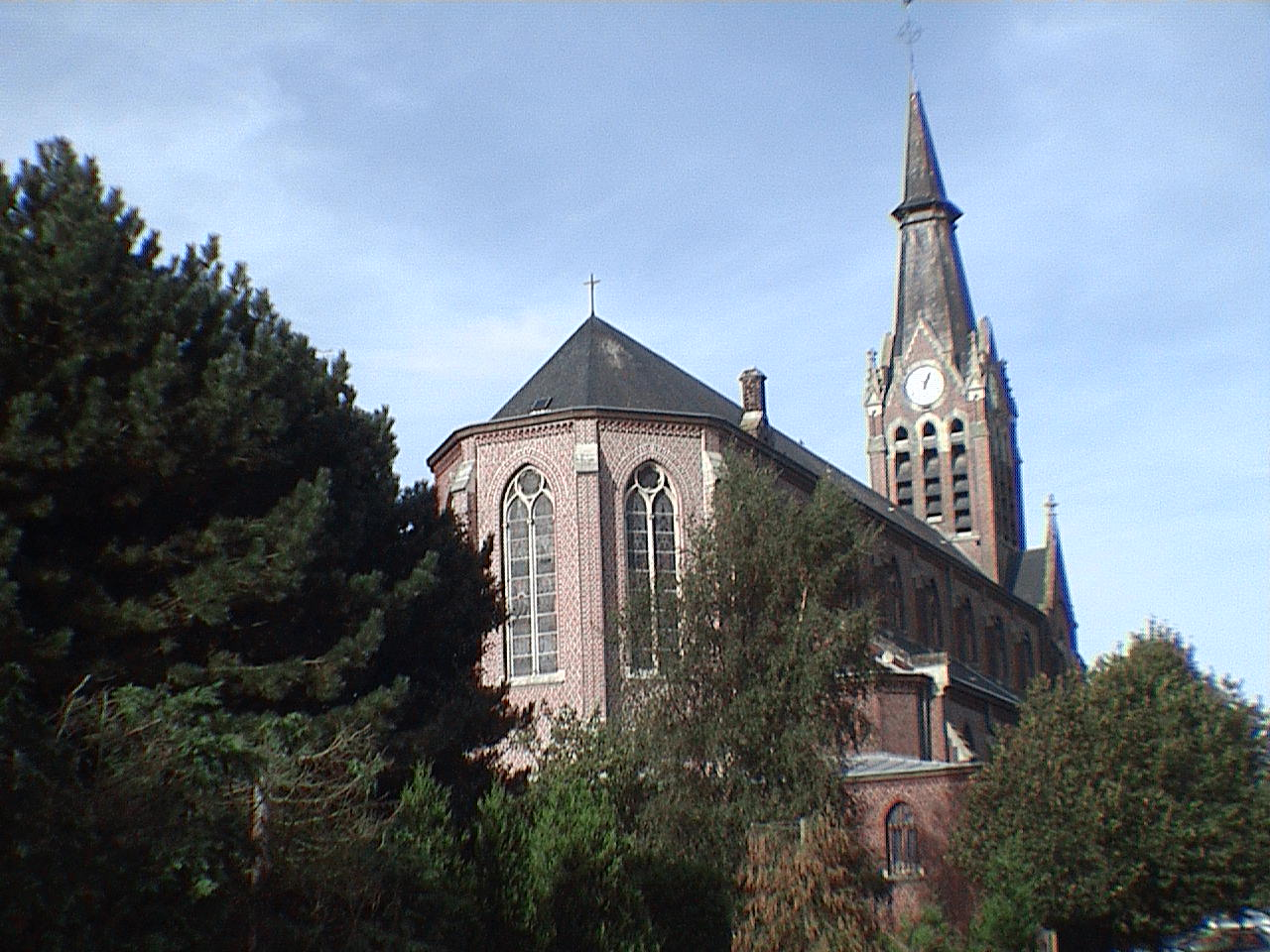 L'église de Godewaersvelde